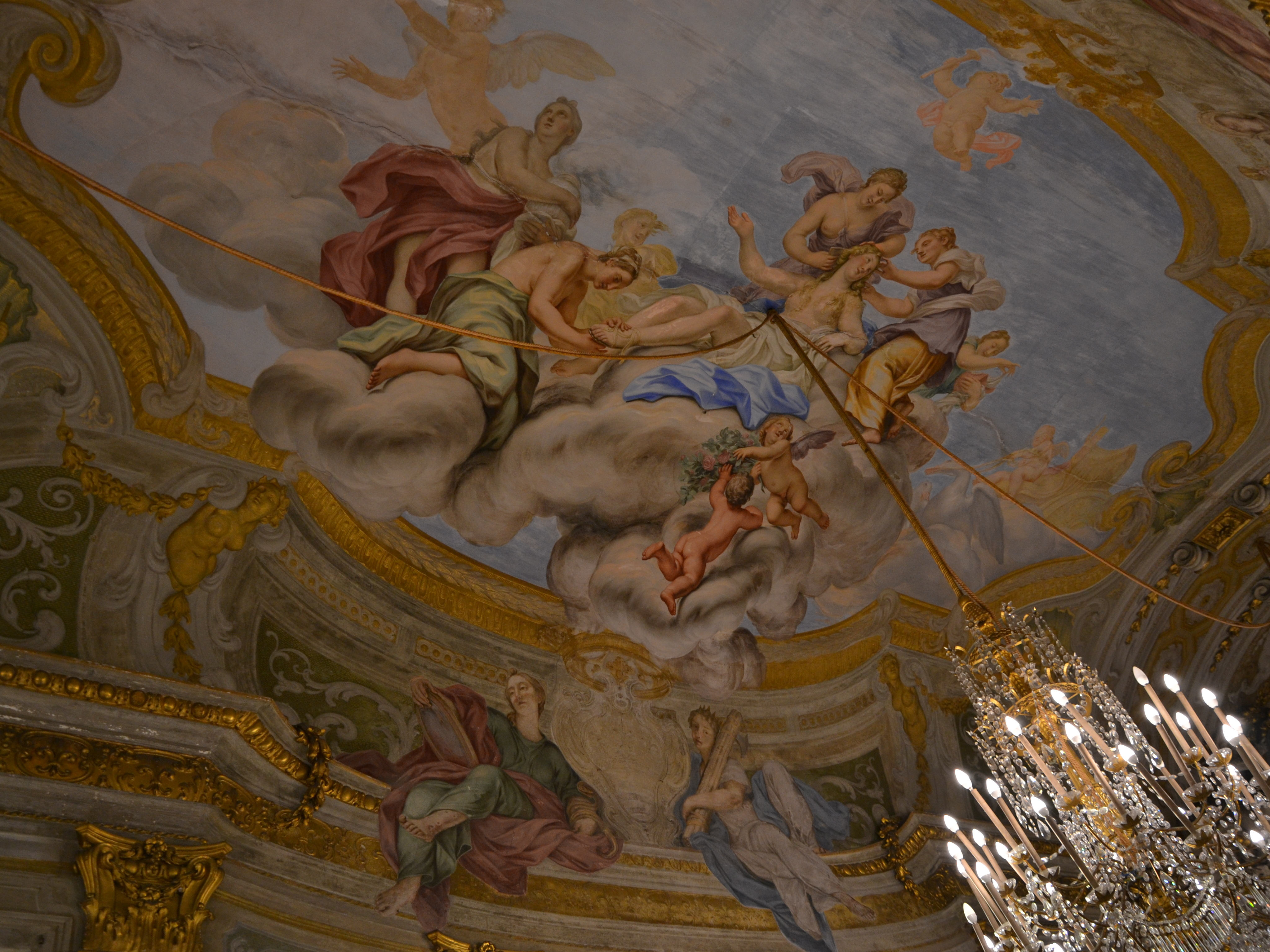 Palazzo Reale (Genoa) - Galleria degli specchi